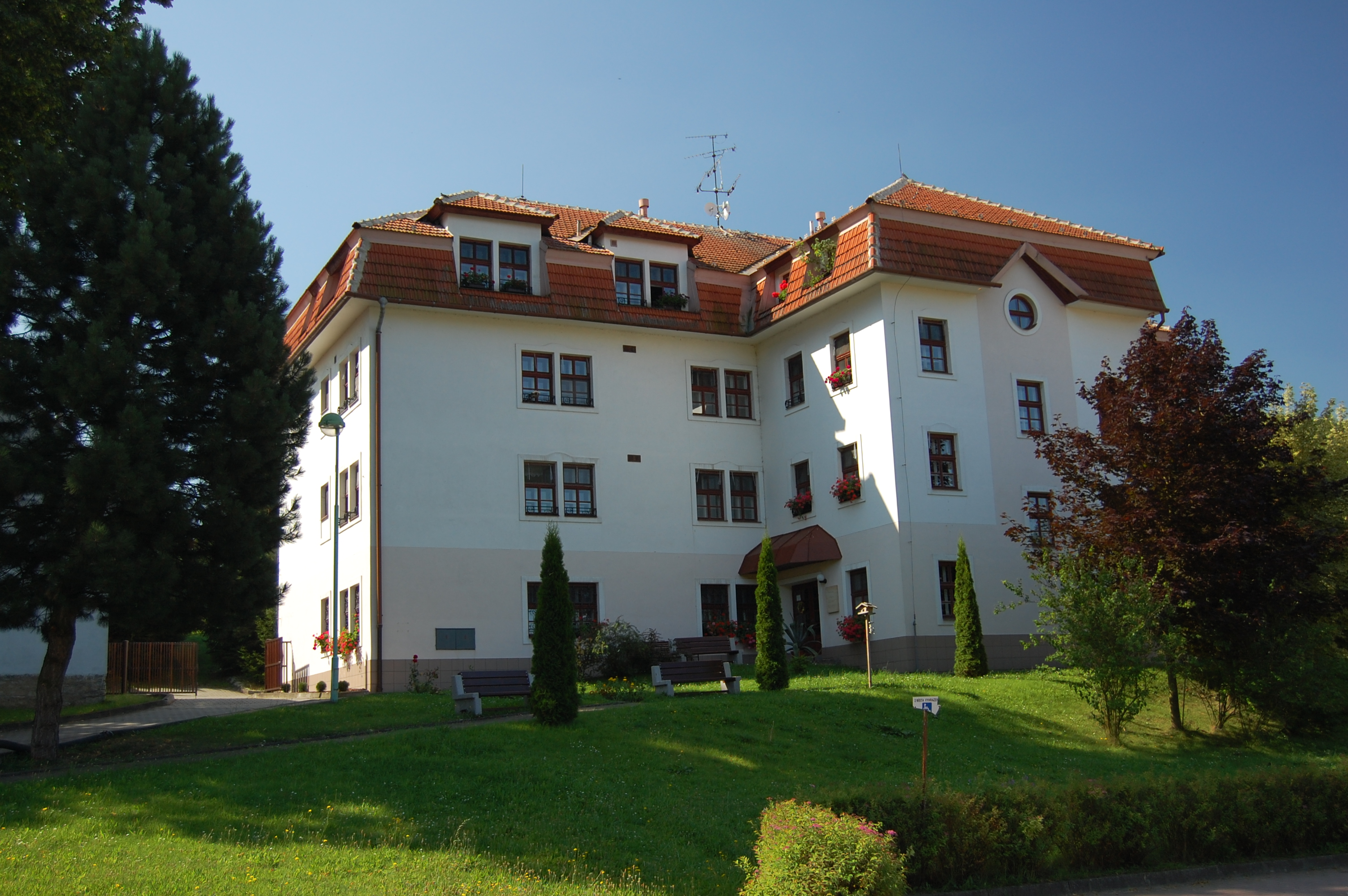 Domov důchodců, Ludmírov, okres Prostějov